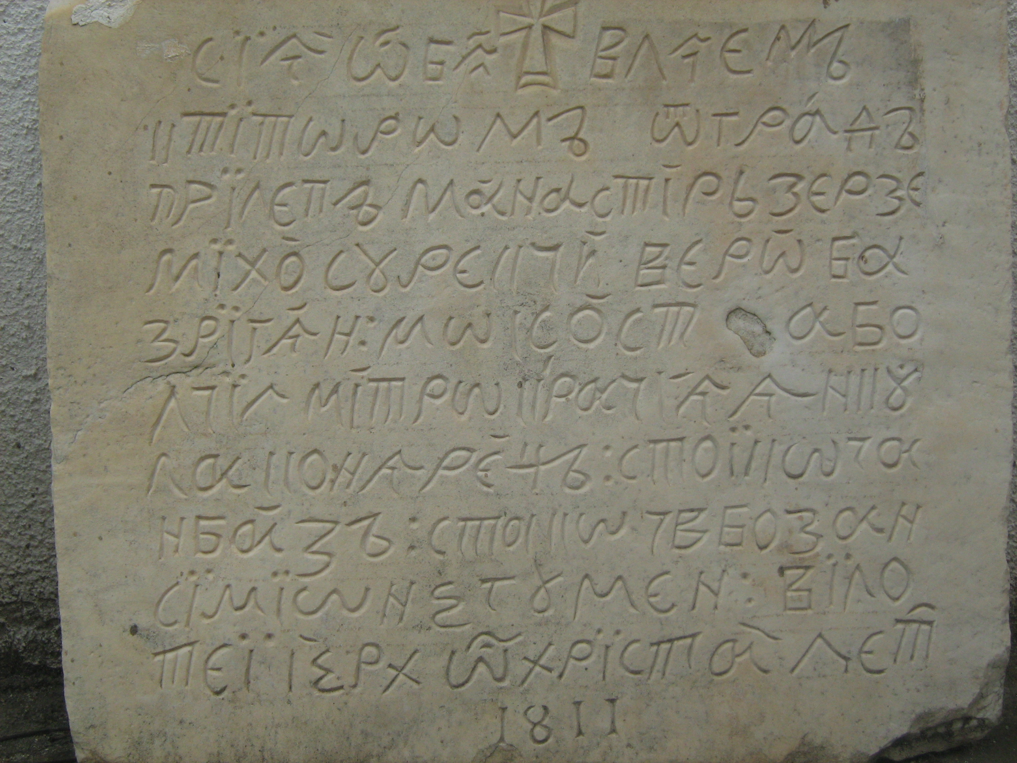 Артефакти во манастирскиот комплекс „Зрзе“